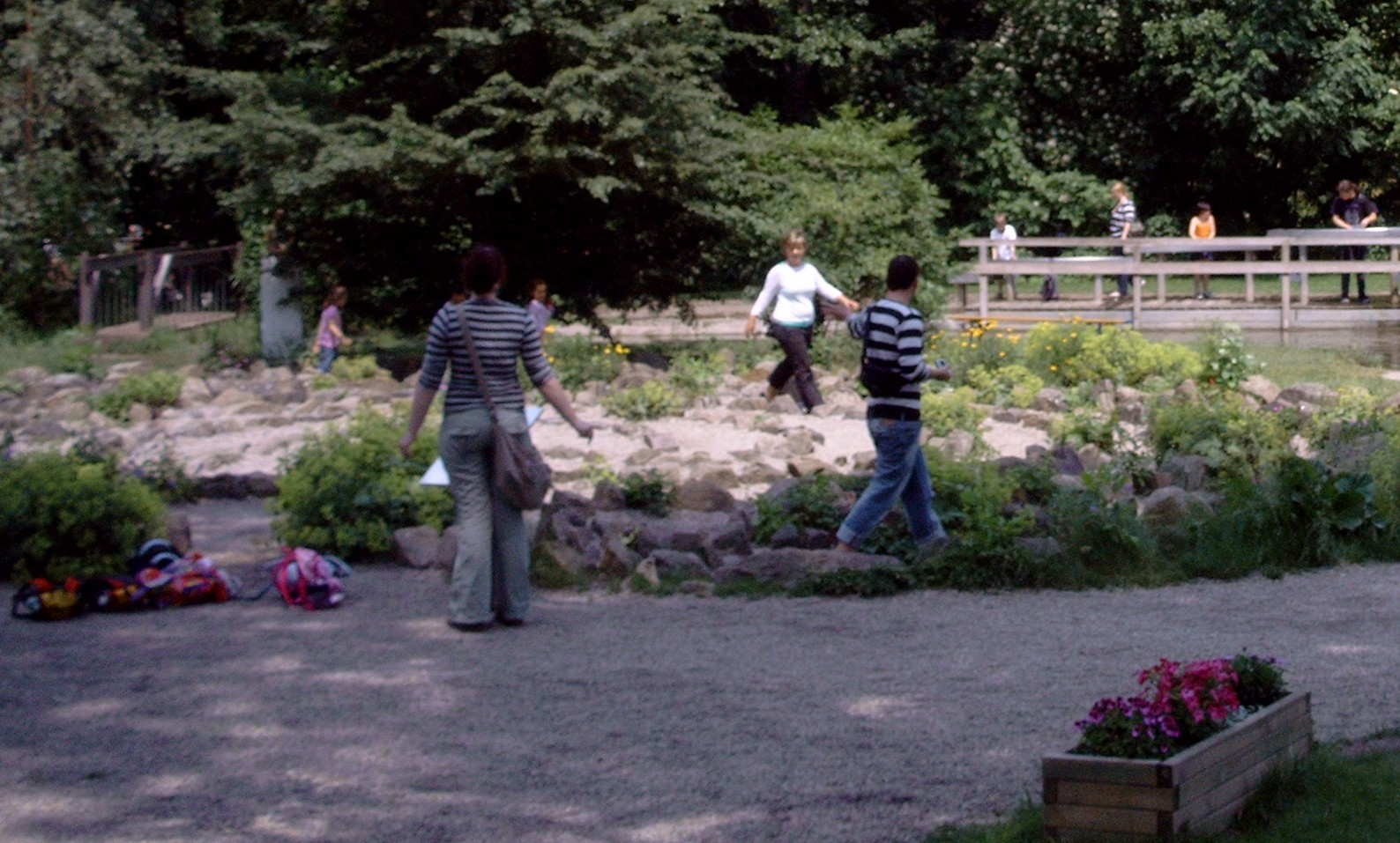 Labyrinth auf dem Erfahrungsfeld zur Entfaltung der Sinne in Nürnberg